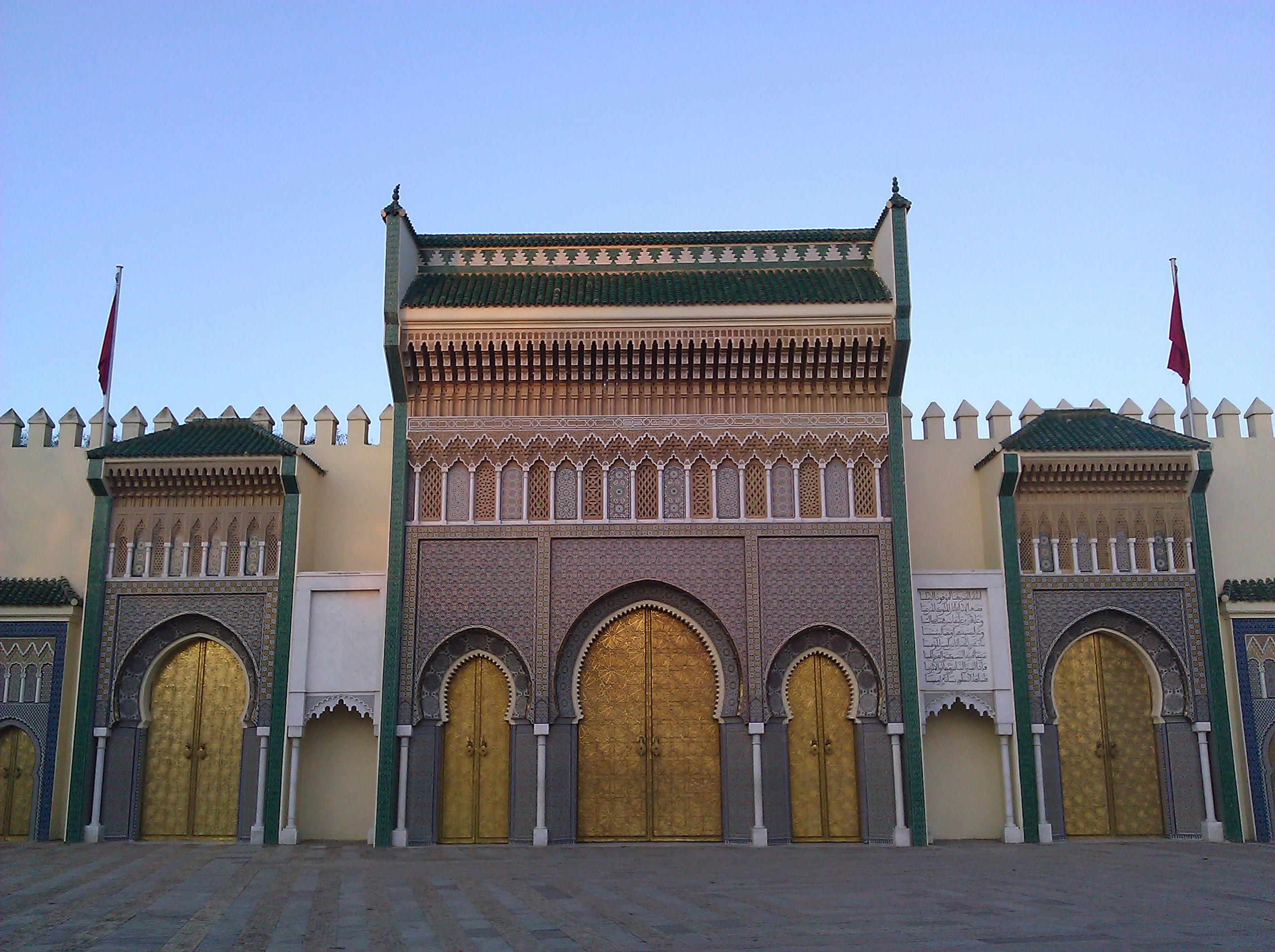 Fes, Morocco